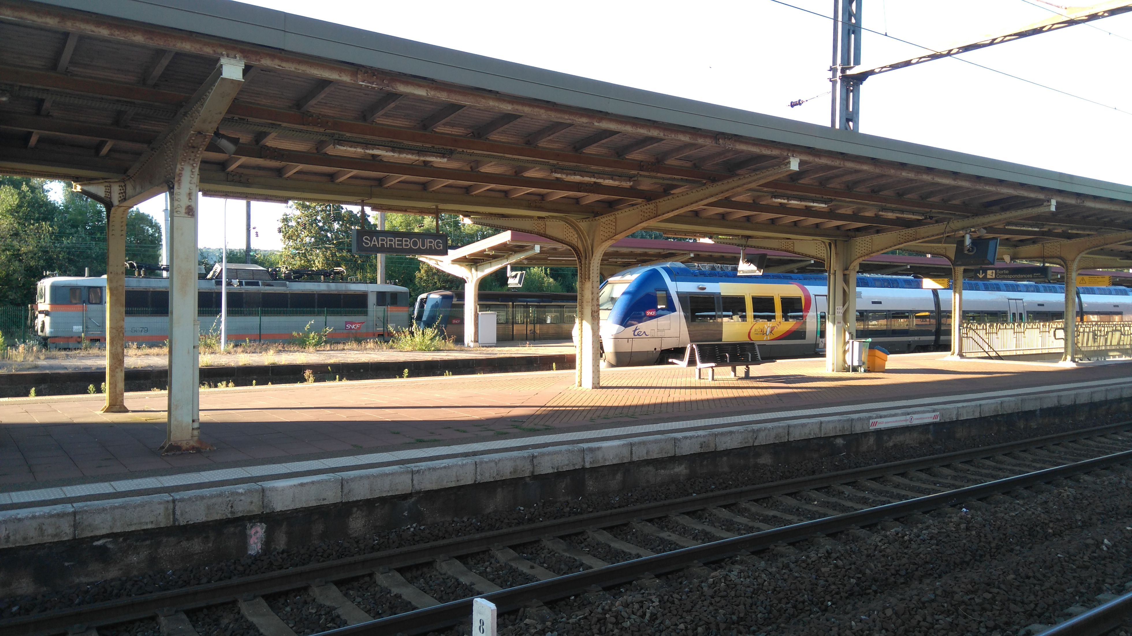 Quais et voies de la gare de Sarrebourg.